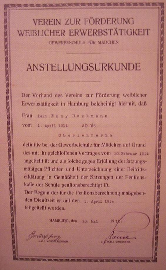 Anstellungsurkunde für Emmy Beckmann in der Gewerbeschule für Mädchen des Vereins zur Förderung weiblicher Erwerbstätigkeit.